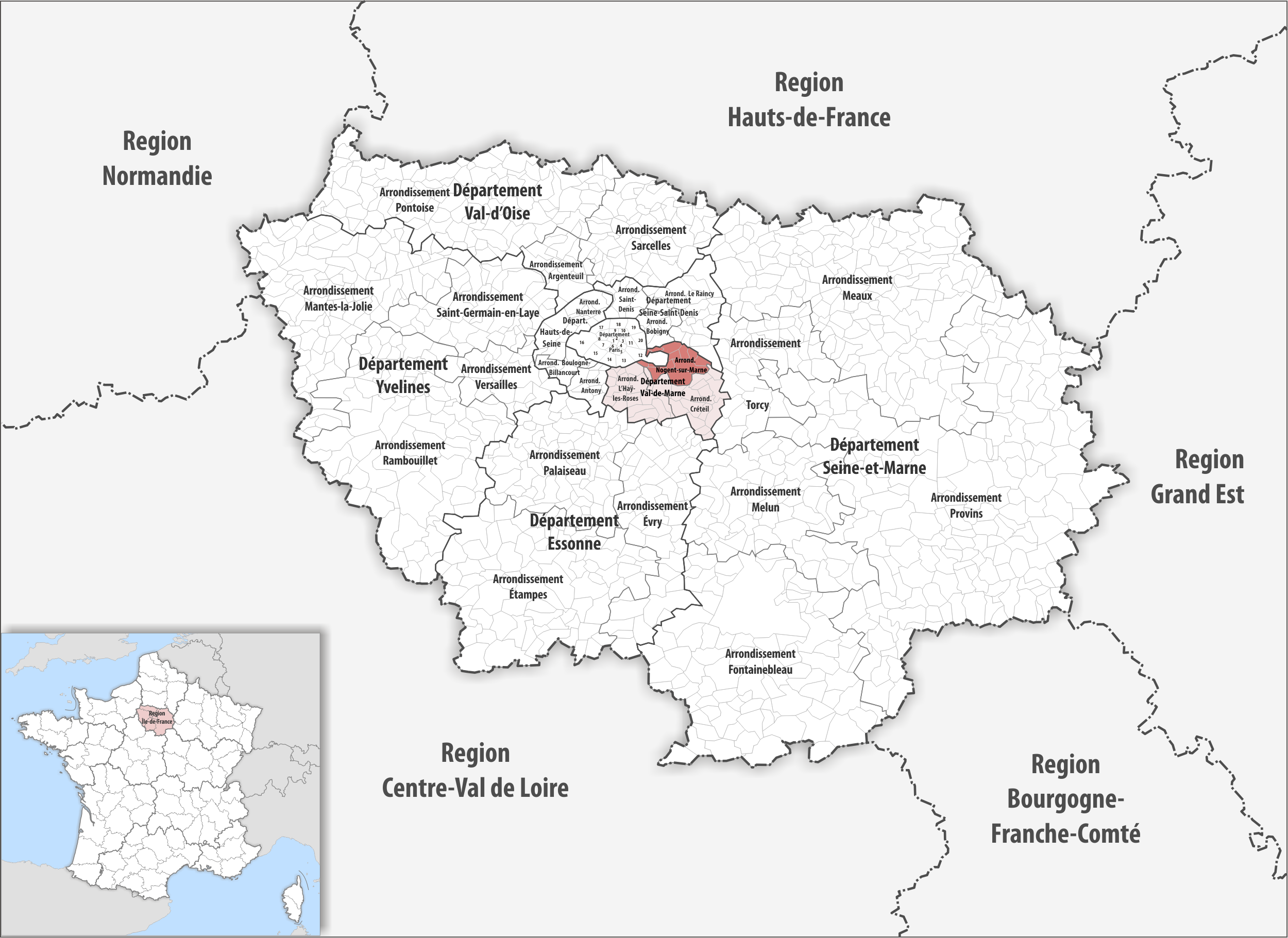 Lage des Arrondissements Nogent-sur-Marne